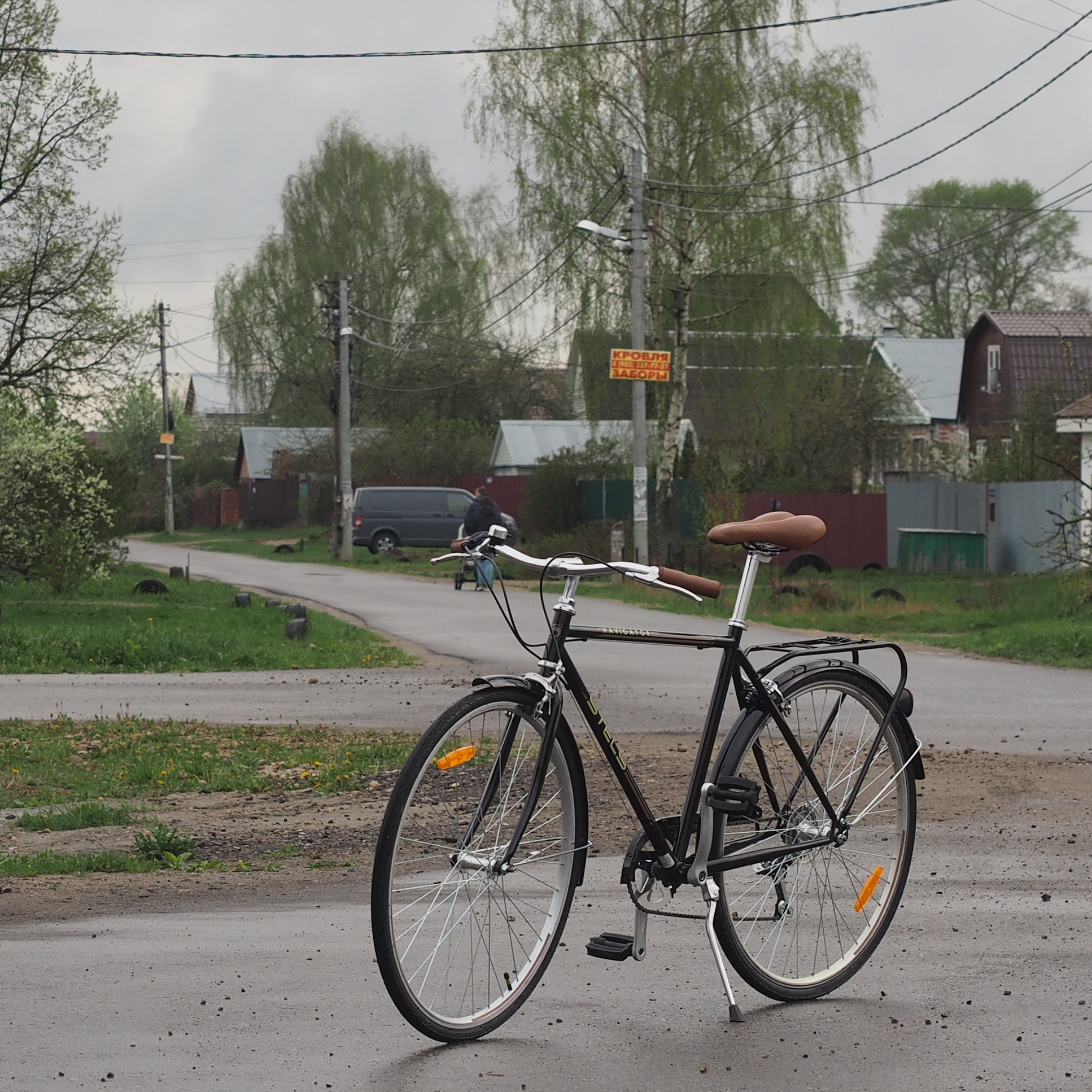 Stels Navigator 360. Выпущен на Жуковском мотовелозаводе 2019-01